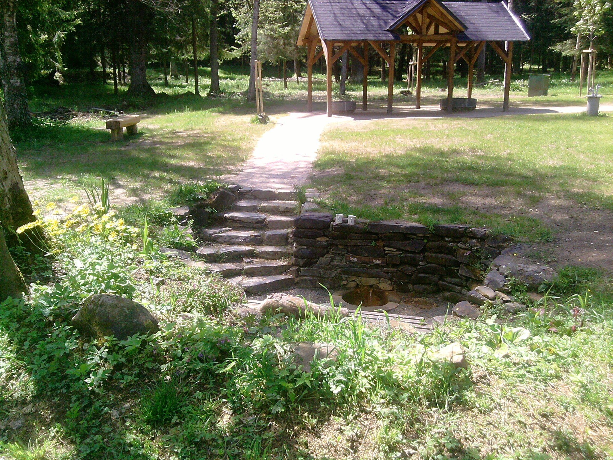 353 01 Prameny, Czech Republic